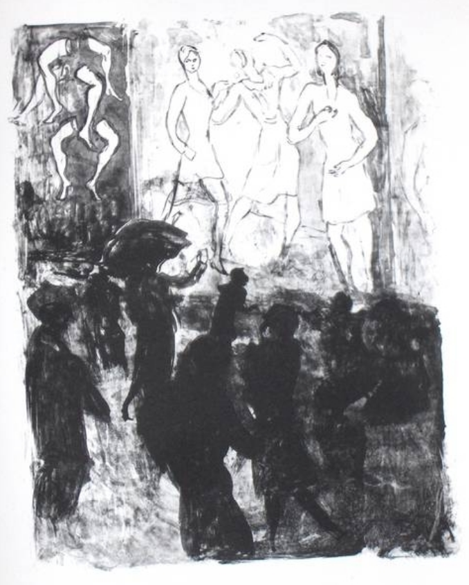 Une des 15 lithographies du recueil D'Après Paris de Léon-Paul Fargue, publié aux Amis de l'amour de l'art, 1931.